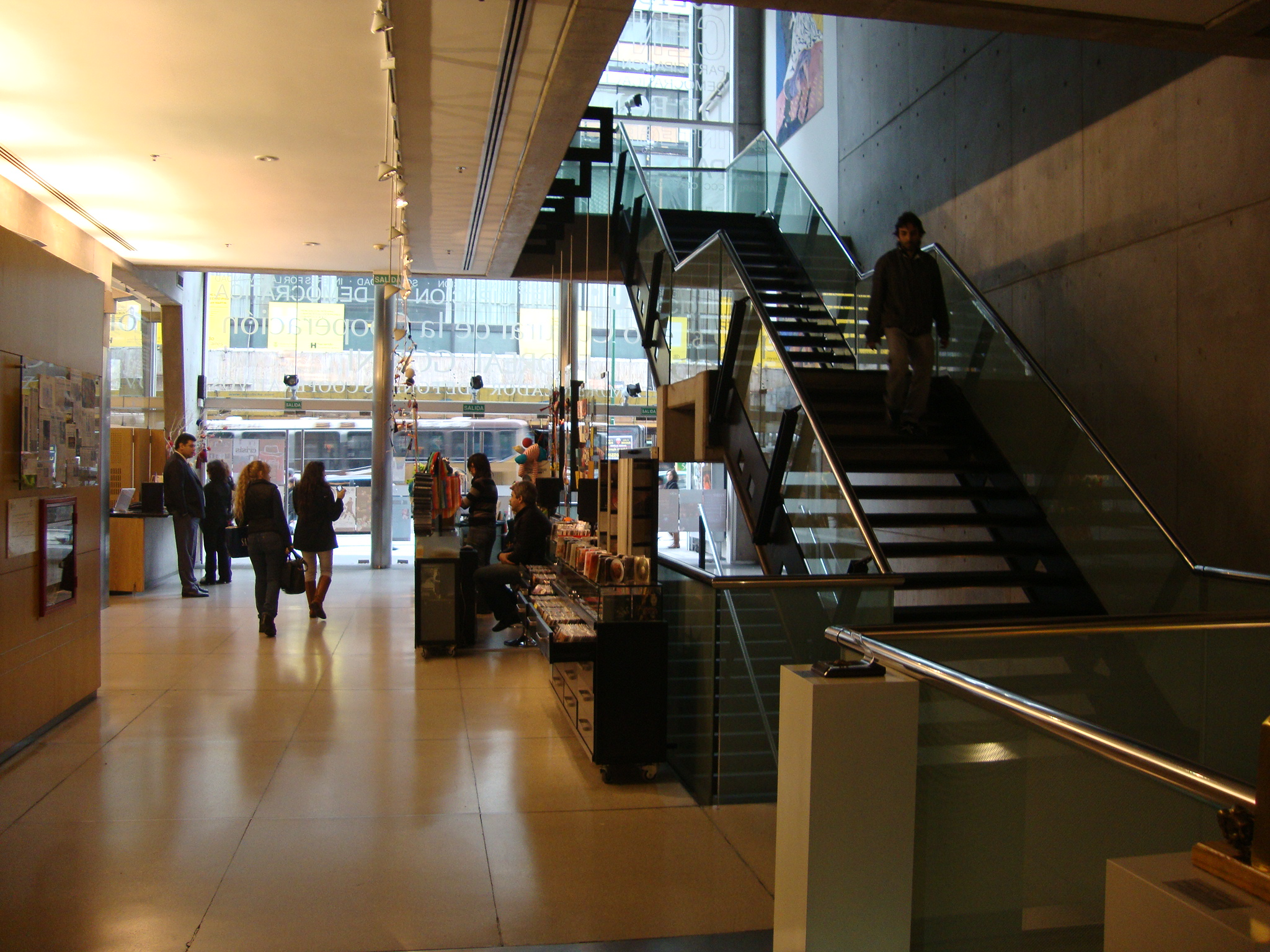 Centro Cultural de Cooperación "Floreal Gorini". Buenos Aires, Argentina.